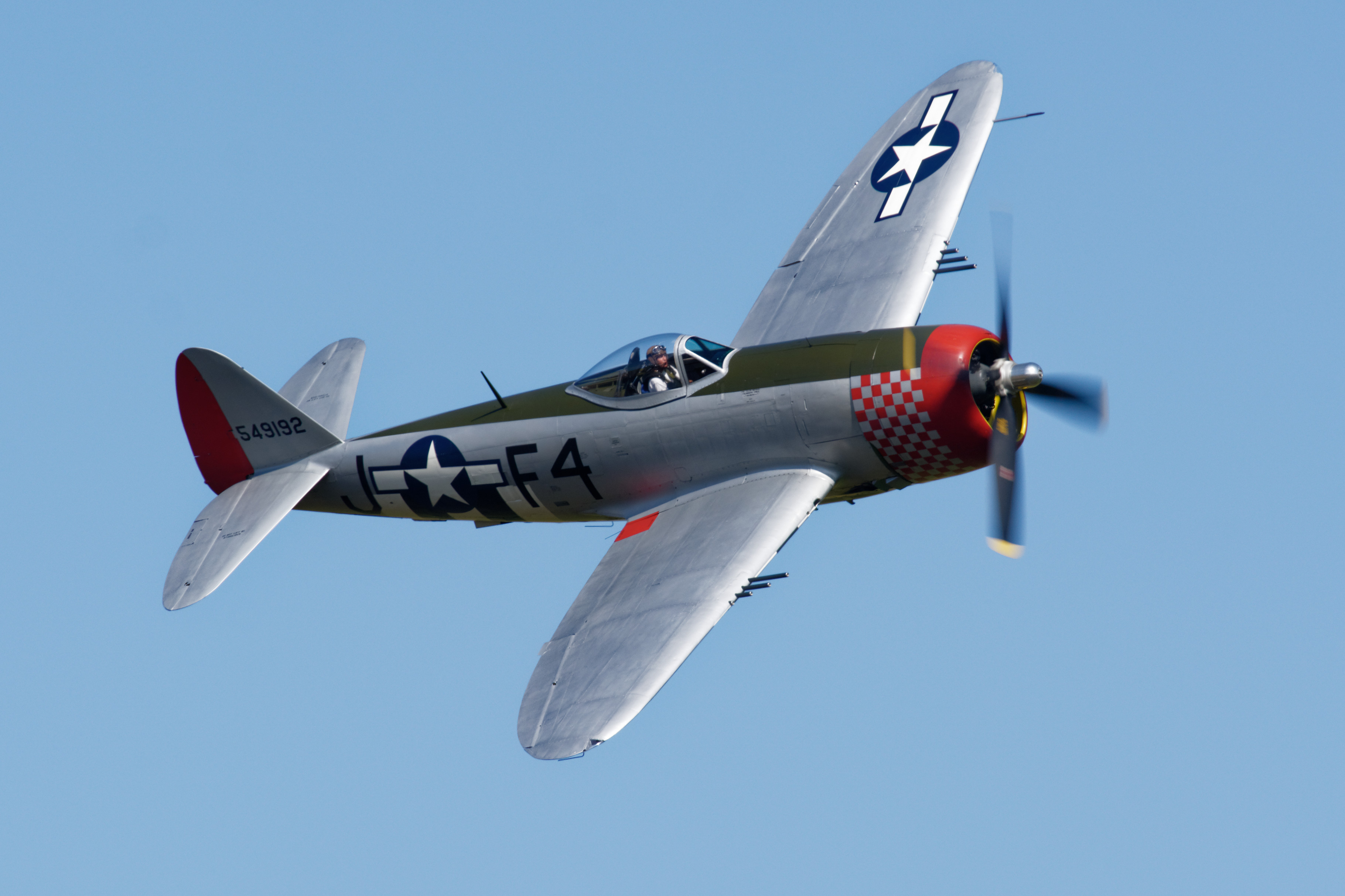 P-47 au meeting de Melun 2018